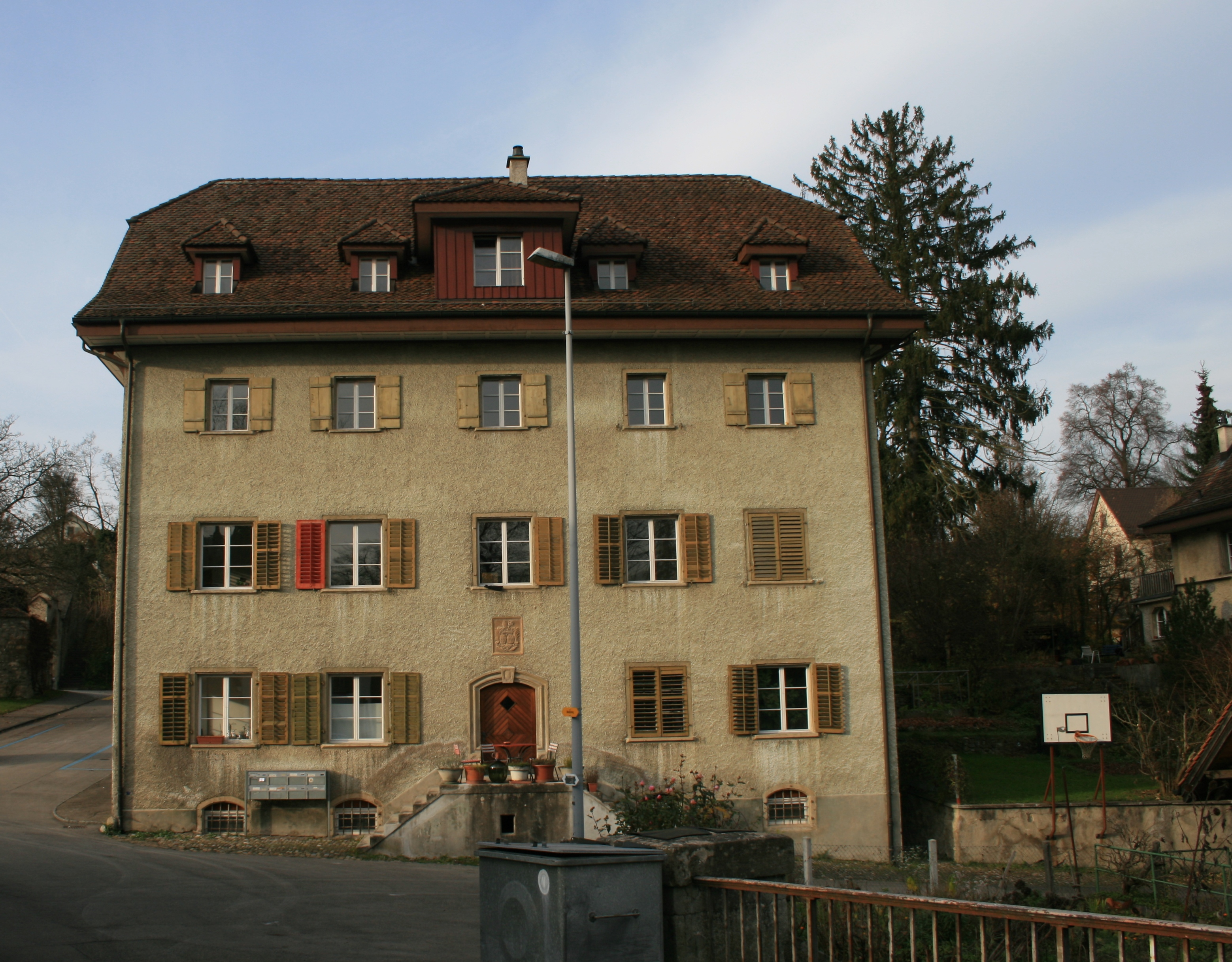 Kanzlerhaus Kanzlerrain, Wettingen